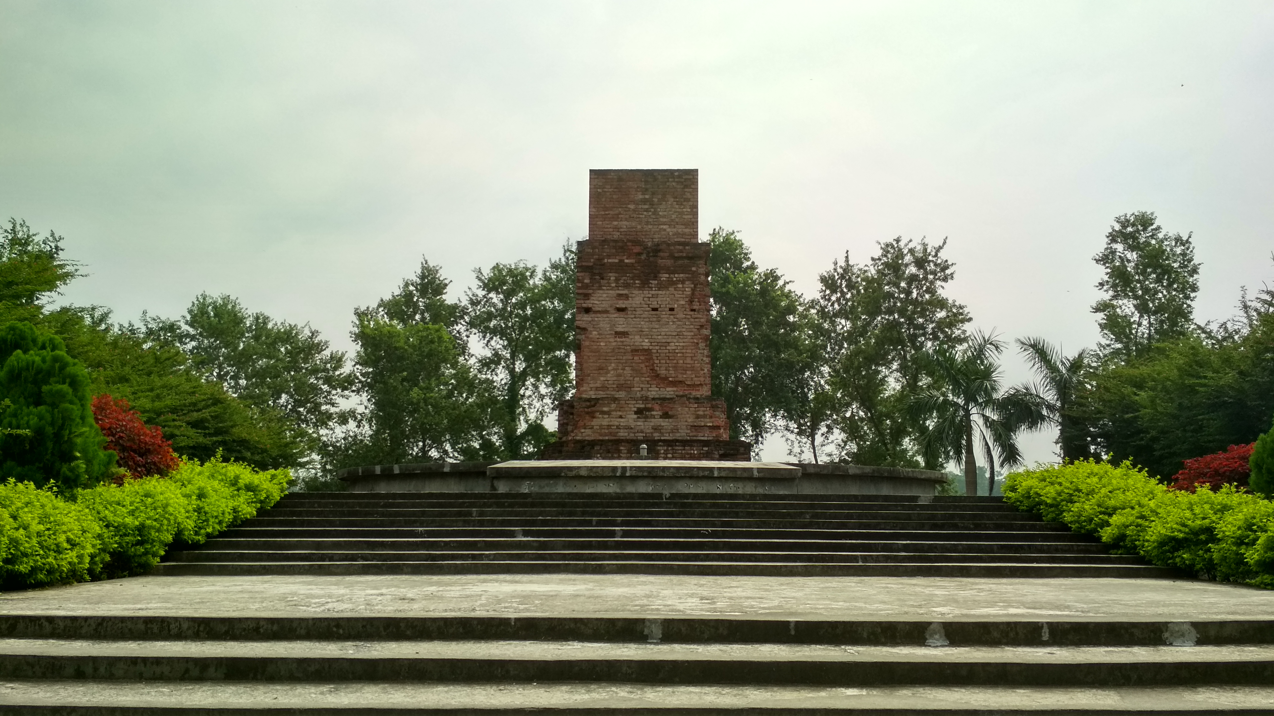 বধ্যভূমি স্মৃতিস্তম্ভ